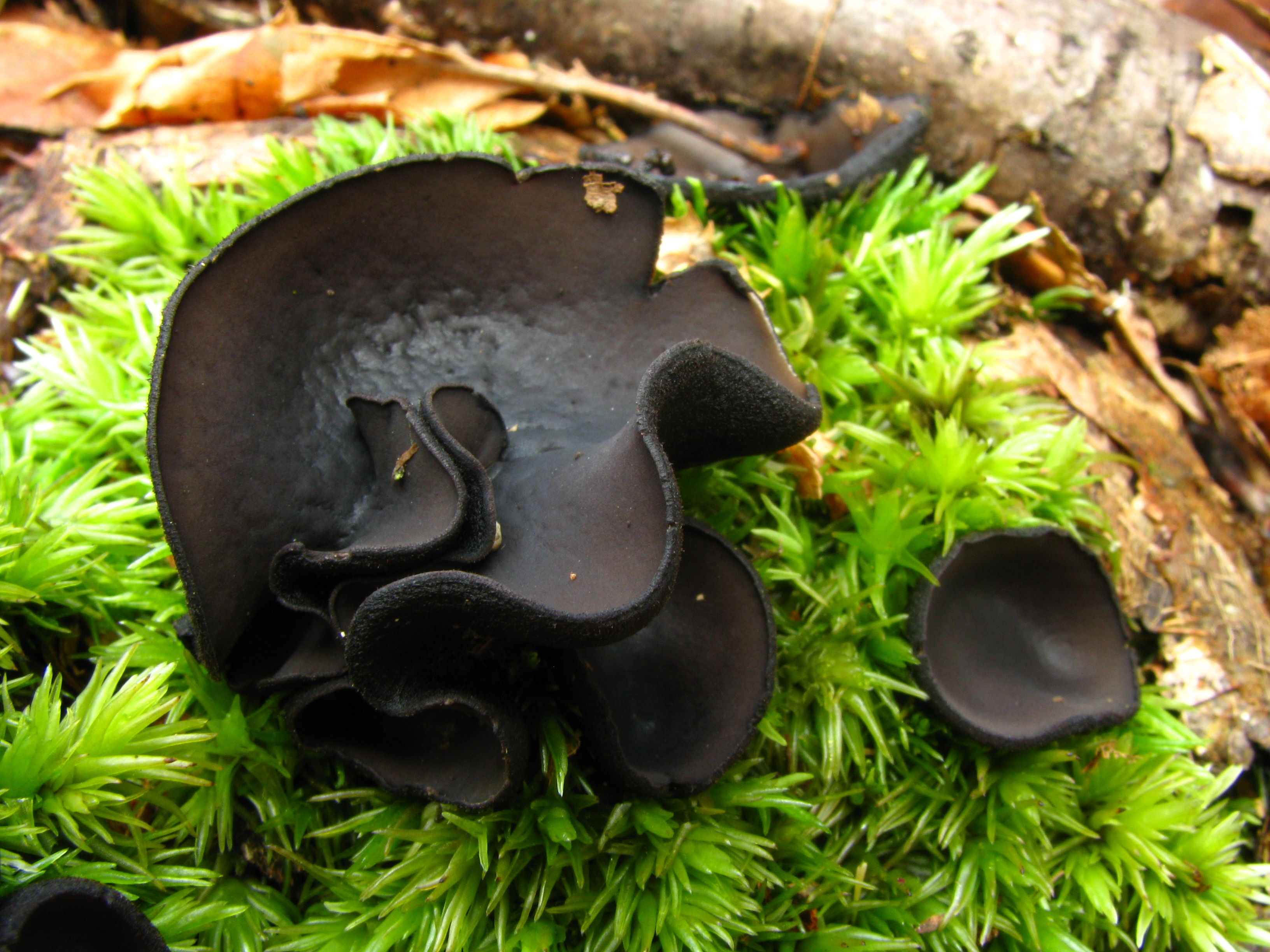 Pseudoplectania nigrella (Pers.) Fuckel